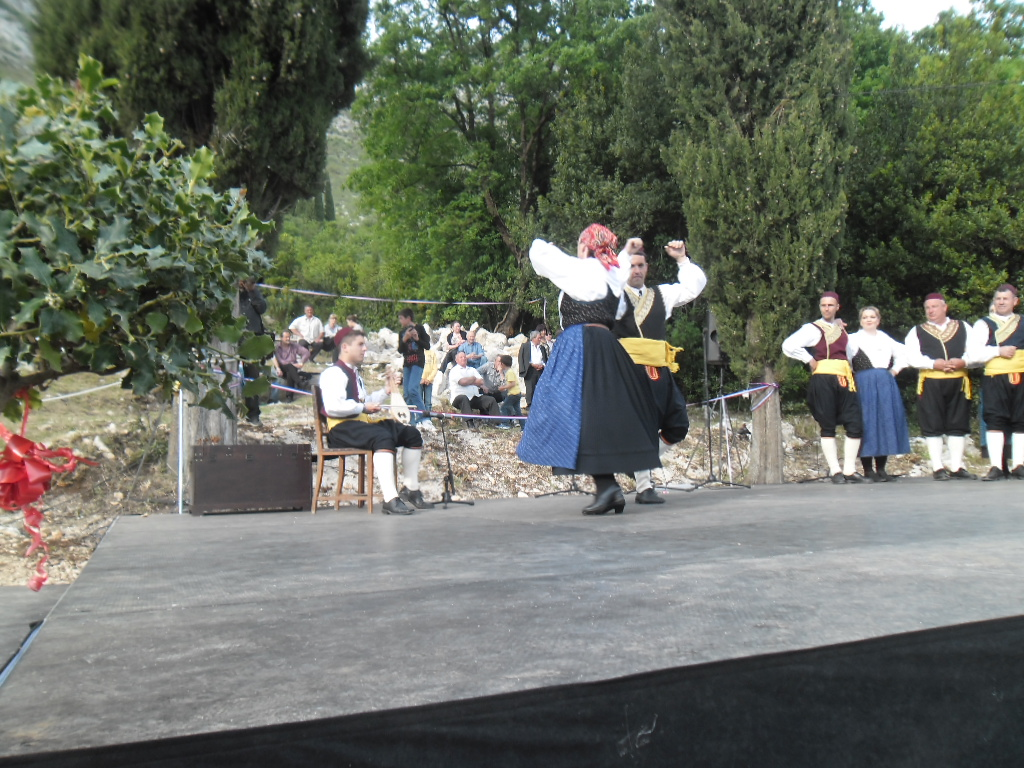 KUD Ponikovska poskočica (Ponikve, općina Ston) svira lijericu, kulturno-umjetnička etno manifestacija Proljeće u Primorju, selo Ljubač, 11. svibnja 2014.